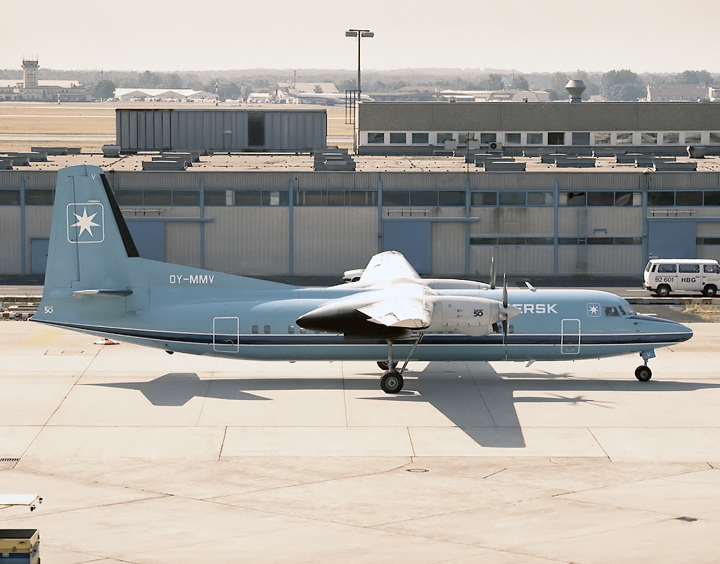 Maersk Air Fokker 50 OY-MMV at Frankfurt Airport